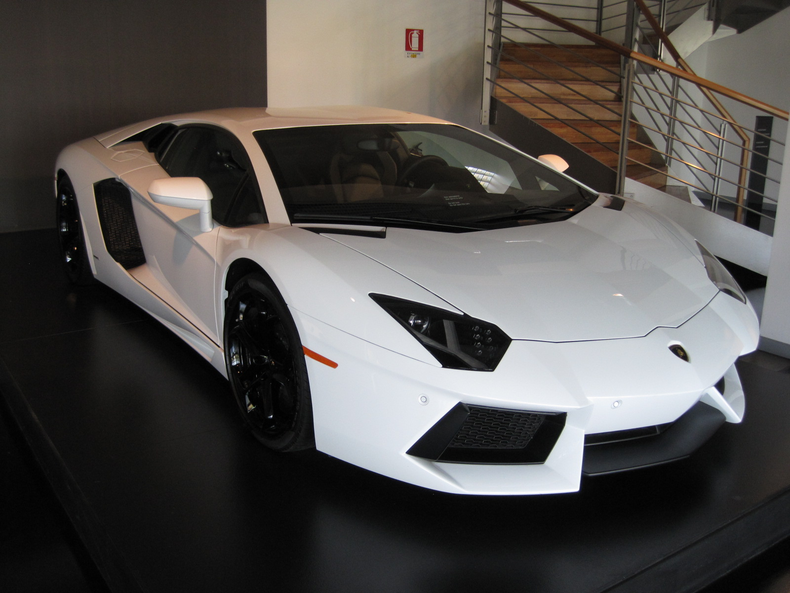 Musée Lamborghini - Boutique